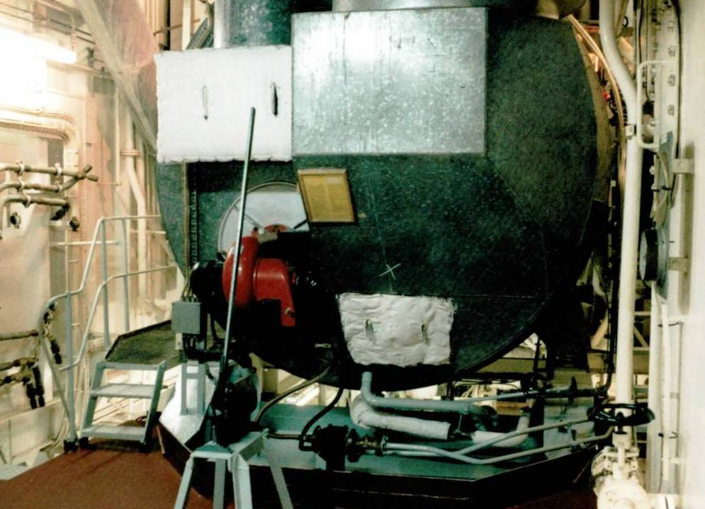 Kombikessel von einem Handelsschiff